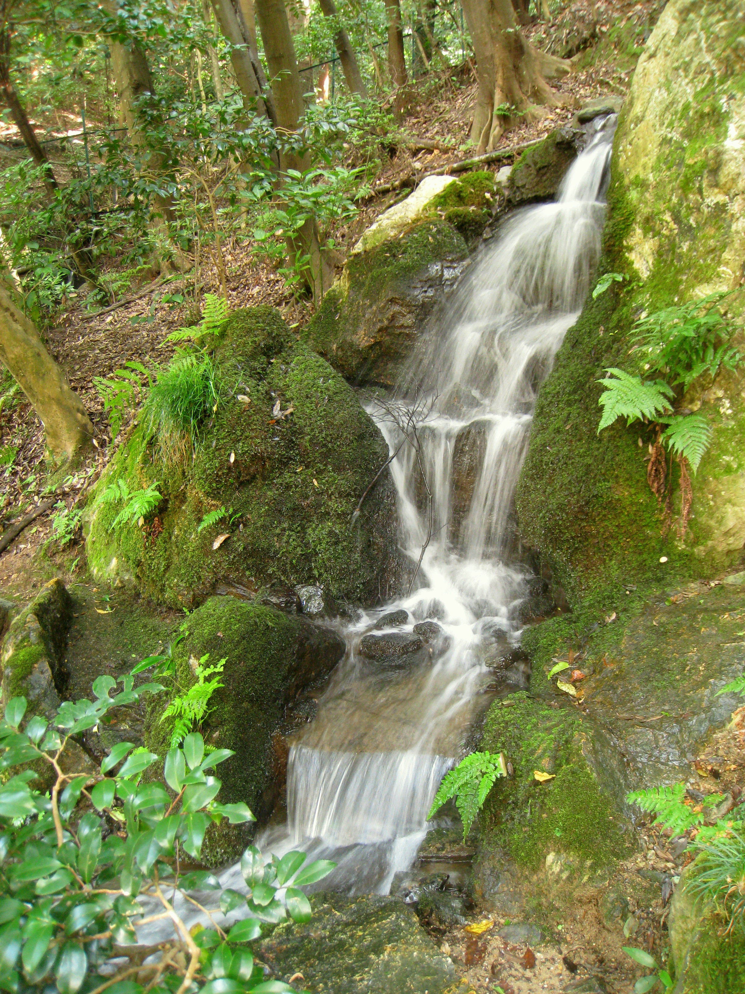 Nanzen-in, Nanzenji temple, Kyoto, Japan.